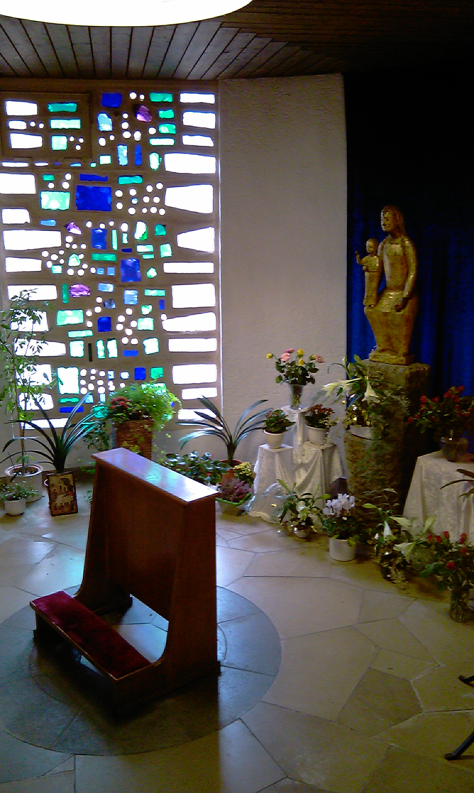 Marienkapelle in der Kirche Maria Königin (Lüdenscheid.